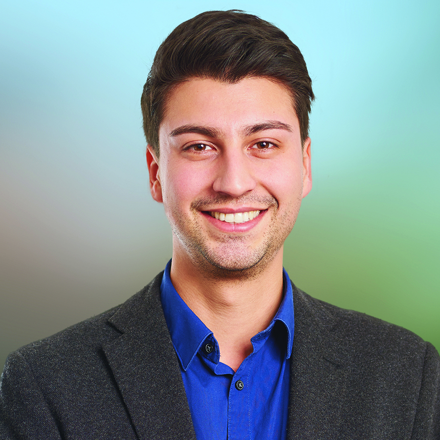 Fabian Molina, Politiker